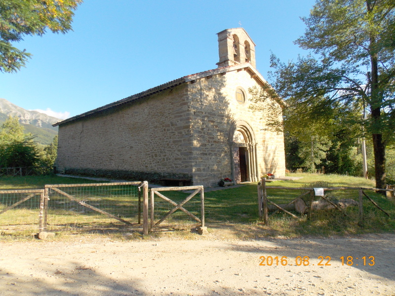 Foto scattata il 22 Agosto 2016